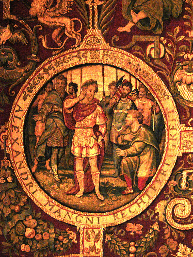 Frederik II af Danmark og Norges bordhimmel, detalje fra selve himlen, Kronborg Slot, udlånt fra Stockholm Museum